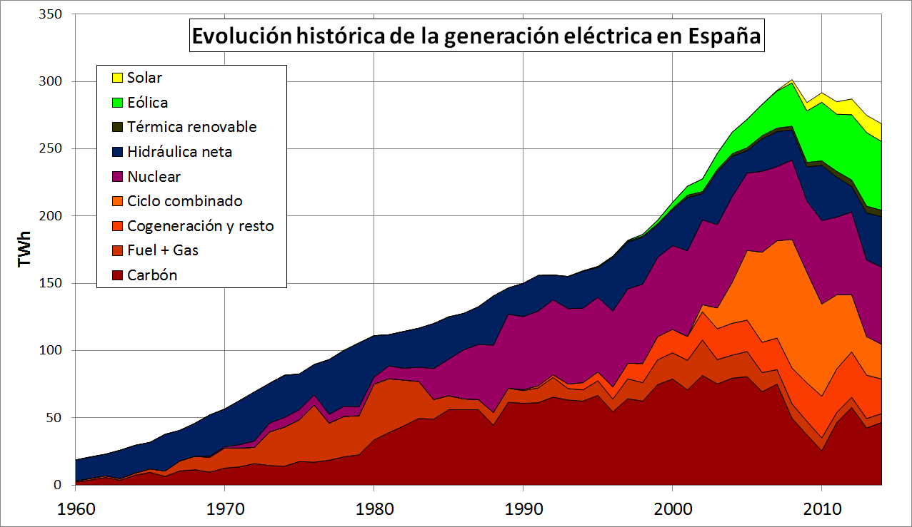 Generación eléctrica de España desde 1960 hasta 2014. Datos de